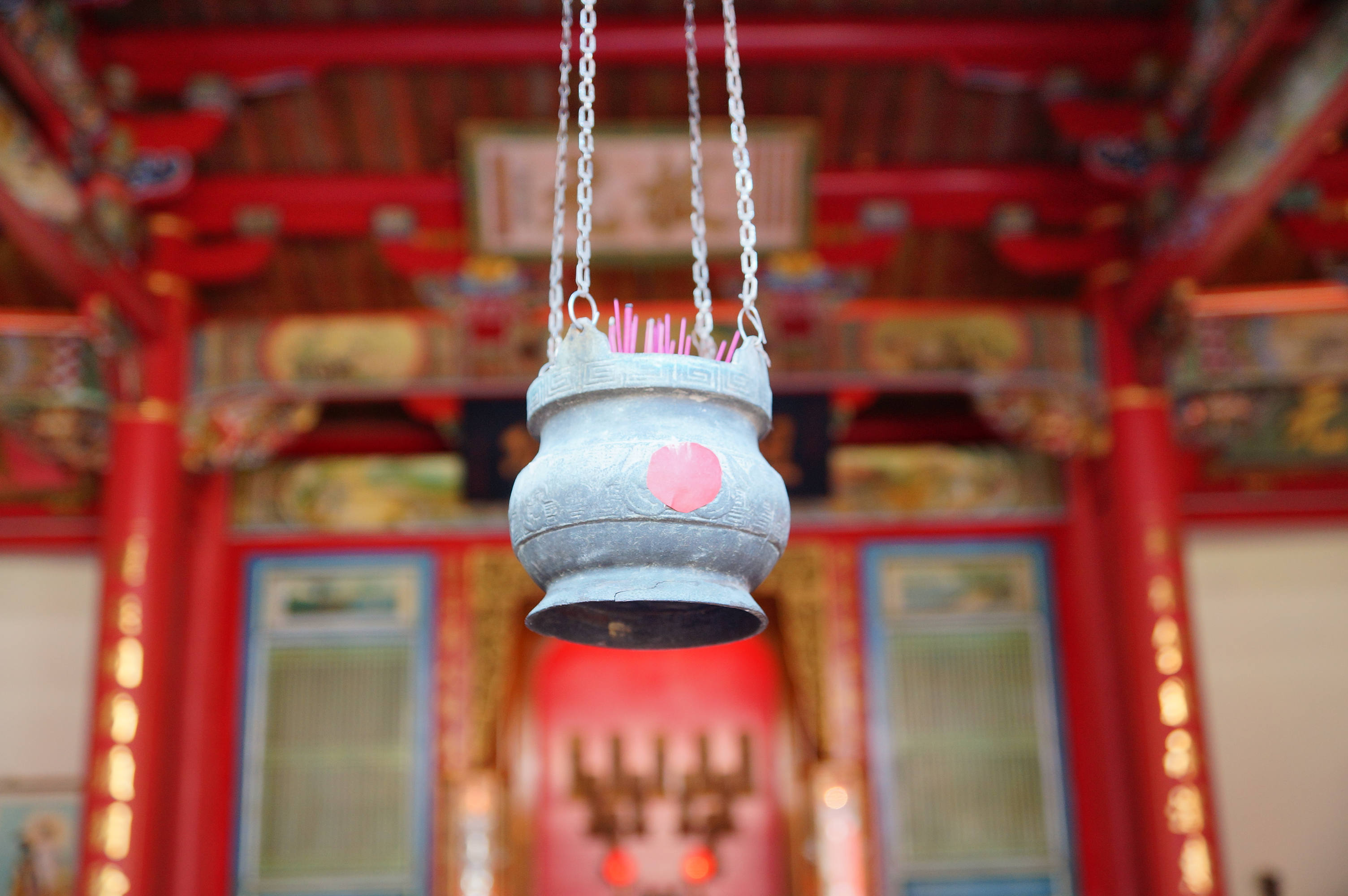 屏東崇蘭蕭氏家廟-三界公爐